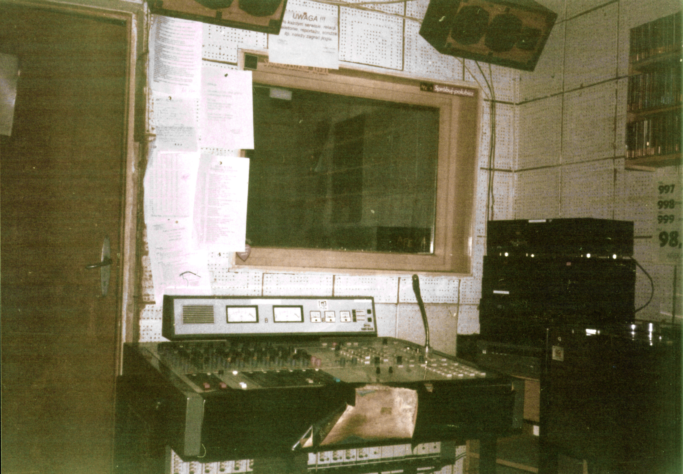 Historyczna, nieistniejąca obecnie realizatorka Radia Afera Poznań.